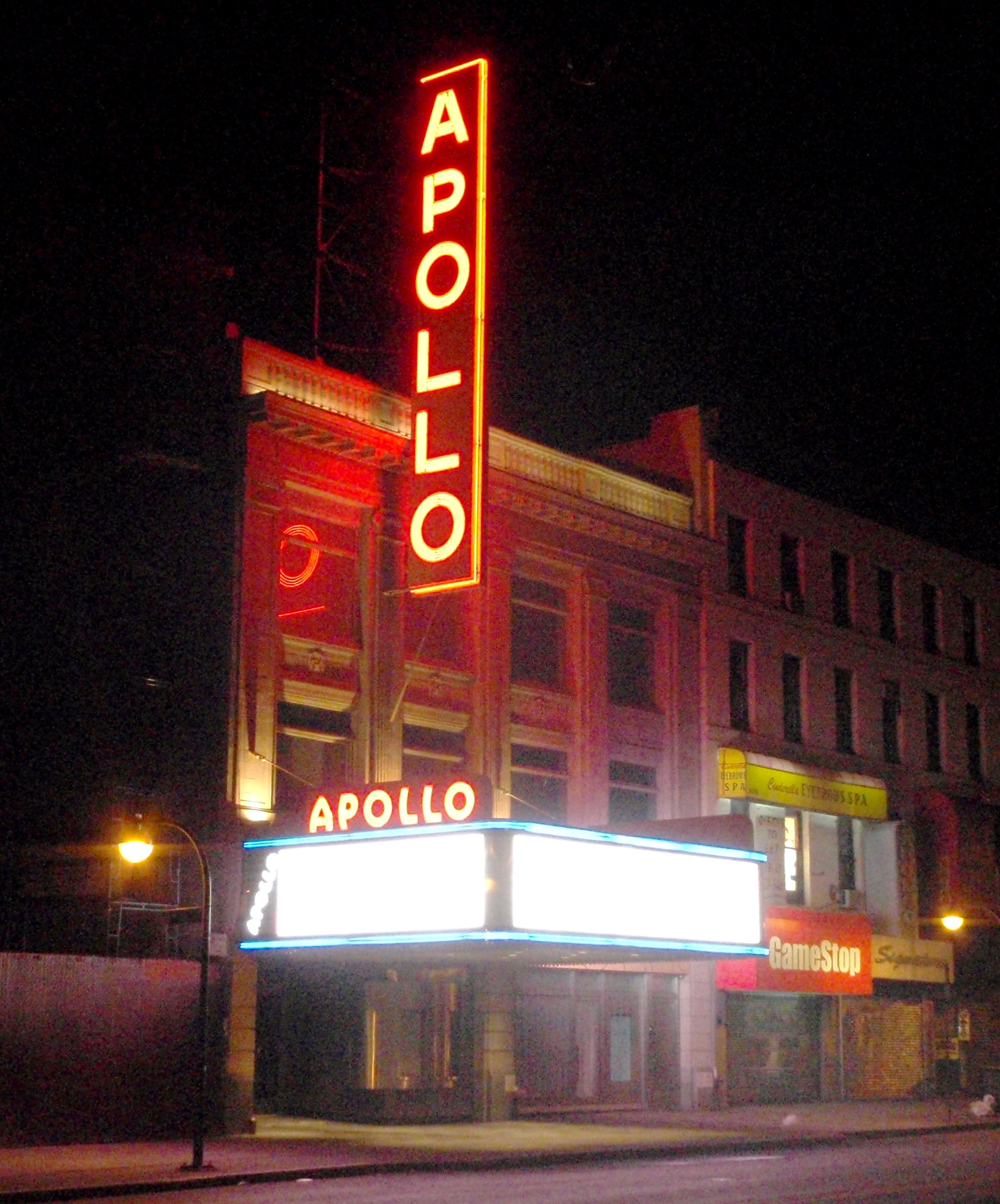 Apollo Theater Harlem NYC 2010